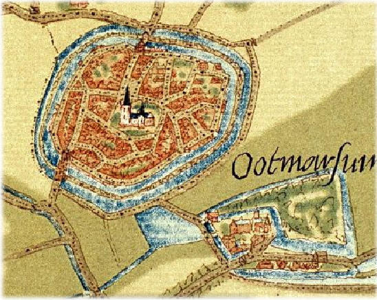 Ootmarsum voor 1597